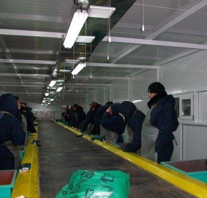 Завод Укреко